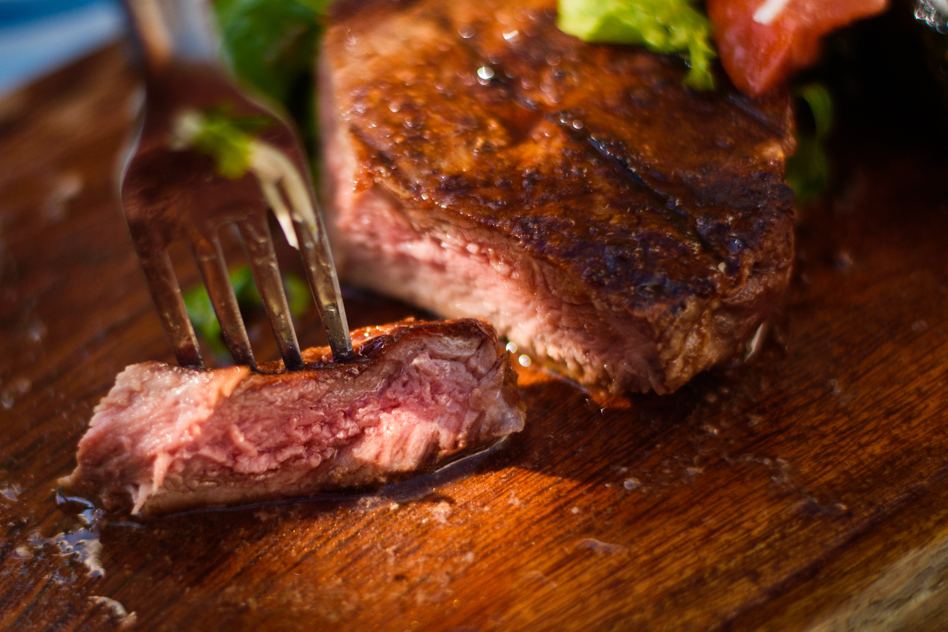 Bife de chorizo a la parrilla exhibiendo el punto justo donde la carne está cocida pero no seca